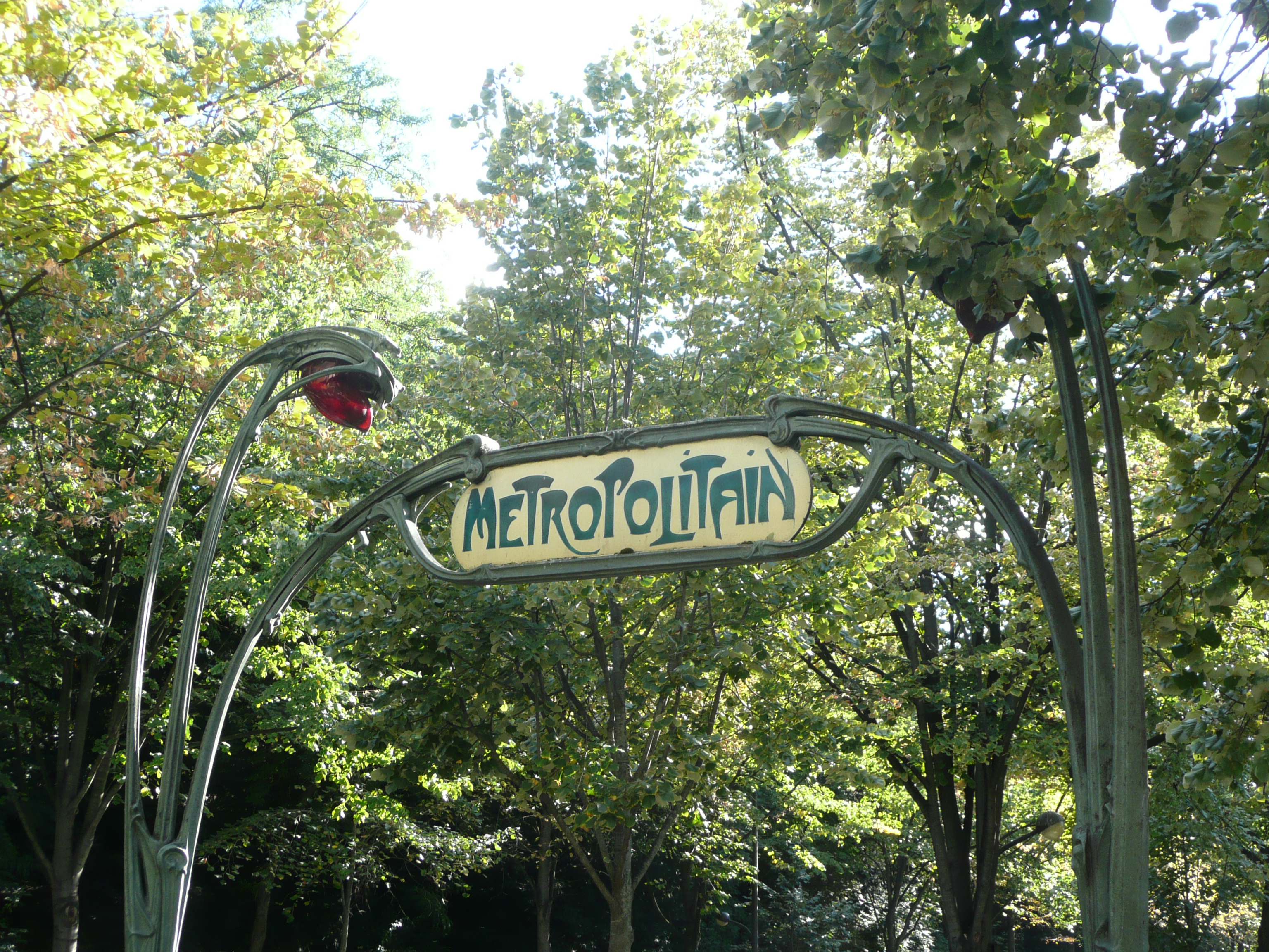 Accès à la station de métro Gambetta (anciennement station Martin-Nadaud), sur la place Martin-Nadaud, à Paris (France). L'habillage a été créé par Hector Guimard et inscrit aux monuments historiques le 29 mai 1978. Catégorie:Image de Paris Catégorie:Hector Guimard